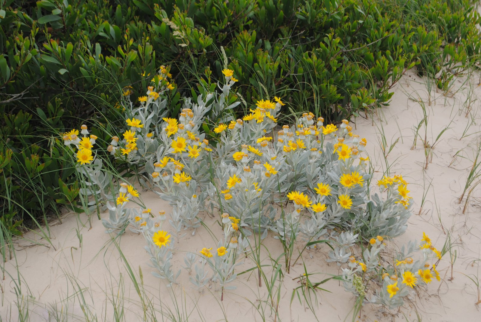 Senecio crassiflorus. Asteraceae. Fotos tomadas sobre dunas al margen del Río de la Plata en Carrasco, departamento de Canelones, Uruguay.